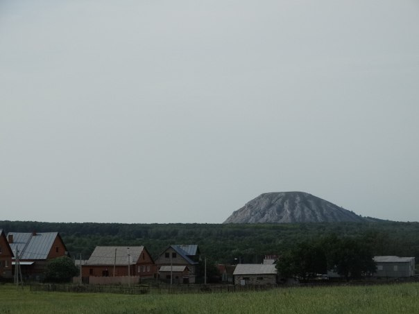 единственный коралловый риф на суше, ишимбайский район, башкирияю